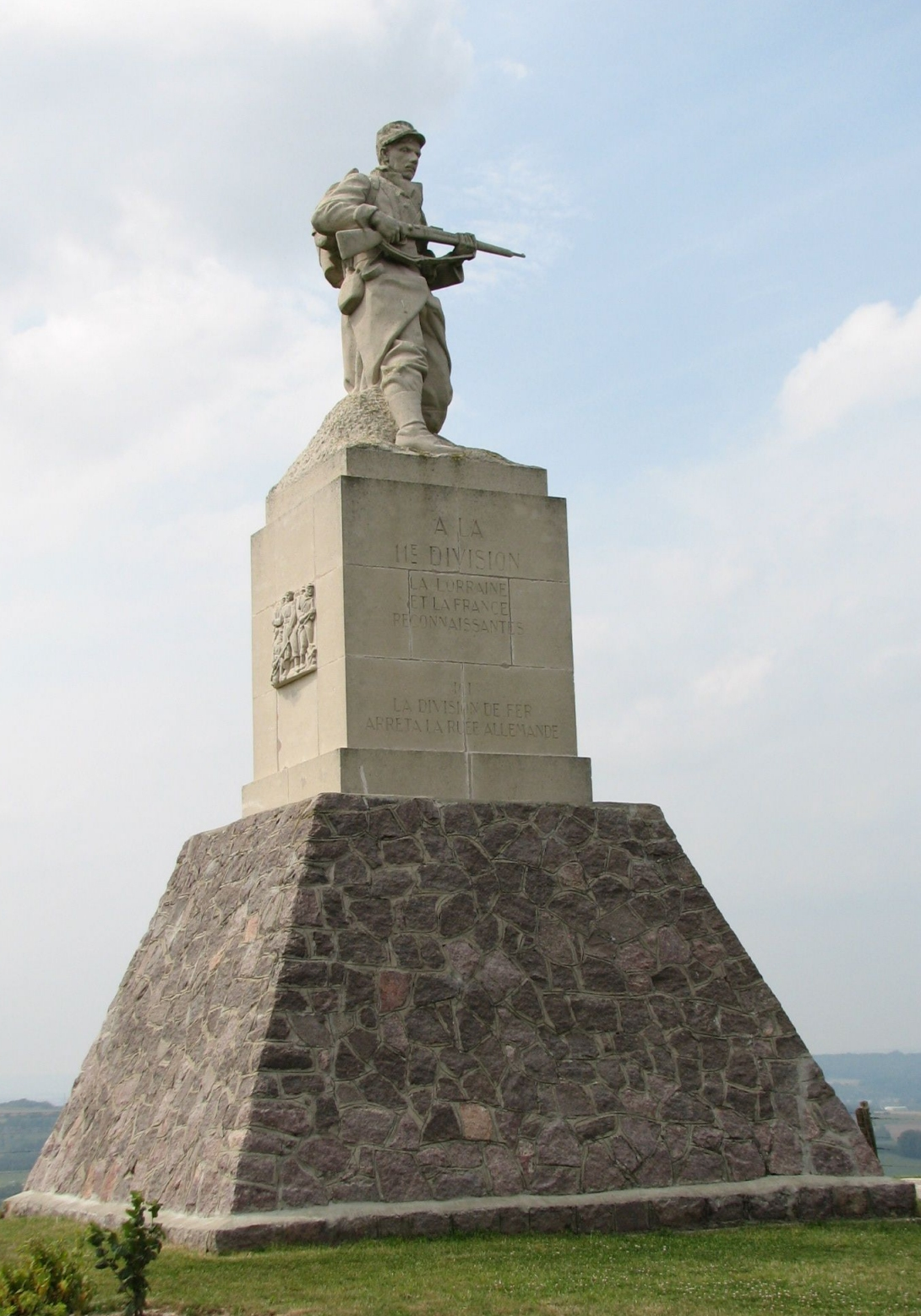 Sanctuaire de Léomont, mémorial de la guerre 1914-1918 (Vitrimont, Meurthe-et-Moselle)